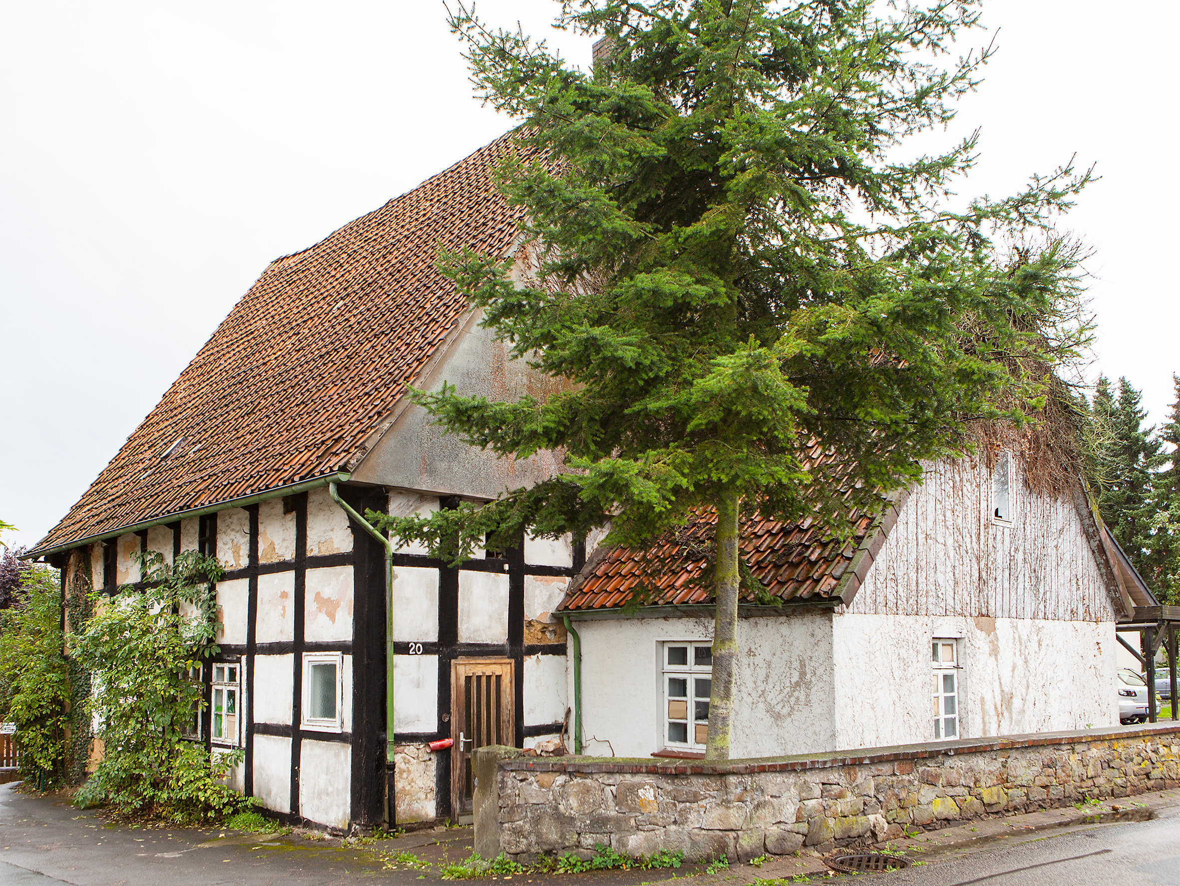 Bad Salzuflen, Stadtteil Ehrsen-Breden, Mittelstraße 20This is a photograph of an architectural monument.